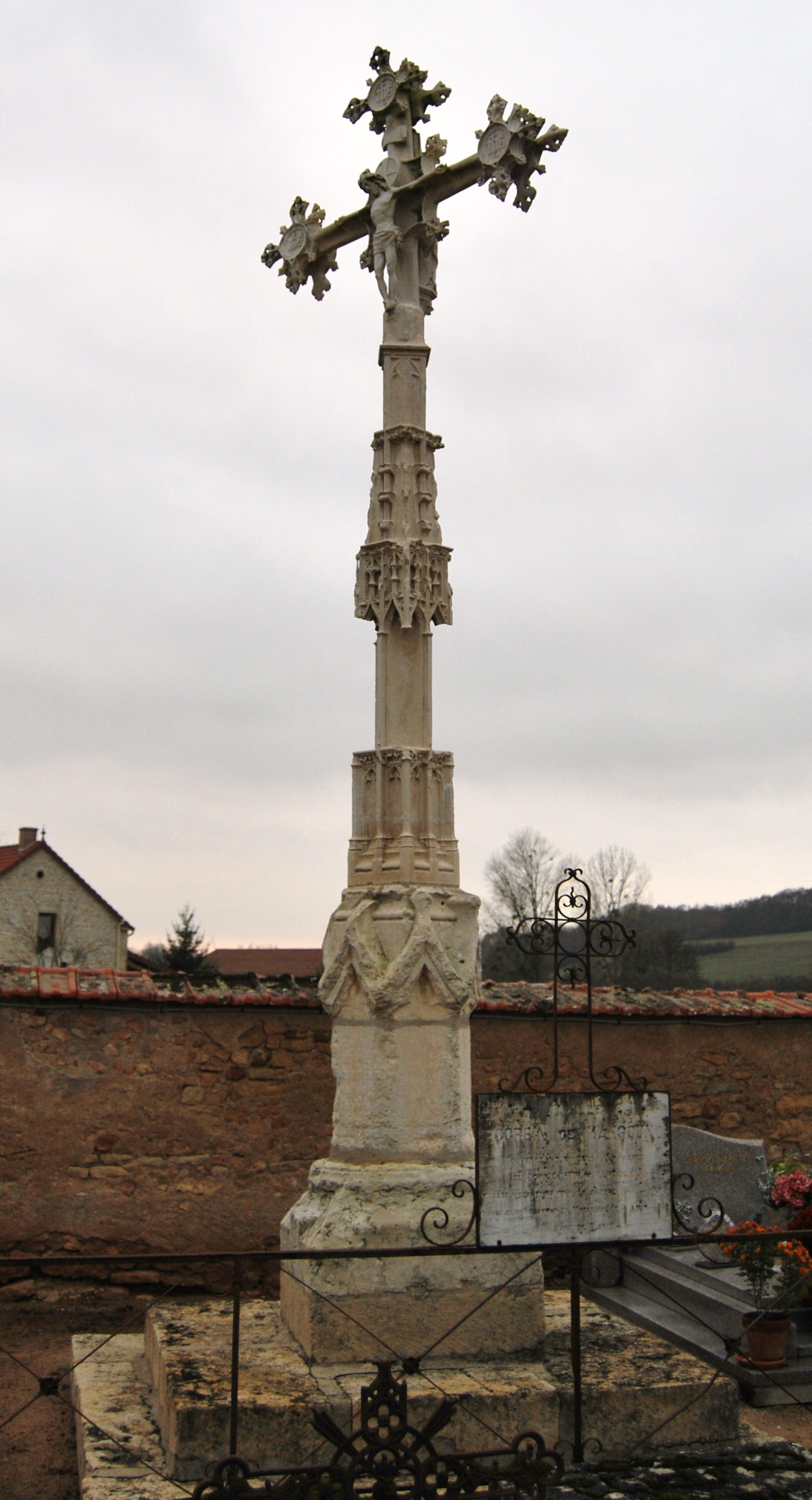 La Croix du cimetière de Coust (Cher - France) datée de 1472 et érigée par la famille de Thianges.